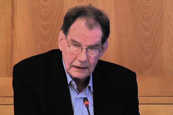 Hubertus Günther